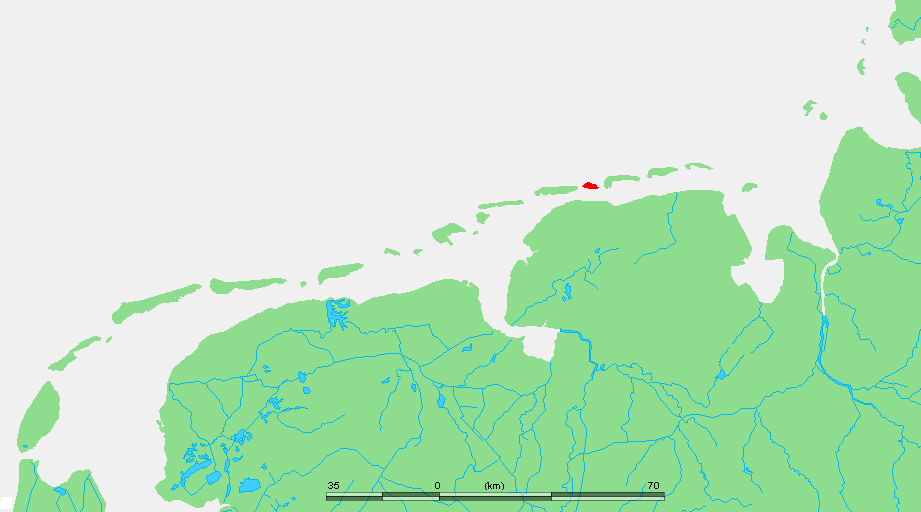 Wadden - Baltrum.PNG